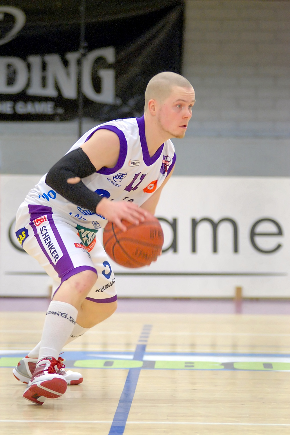 Koripalloilija Roope Suonio Lahdessa 1.3.2010 ottelussa Lappeenrannan NMKY:ta vastaan.